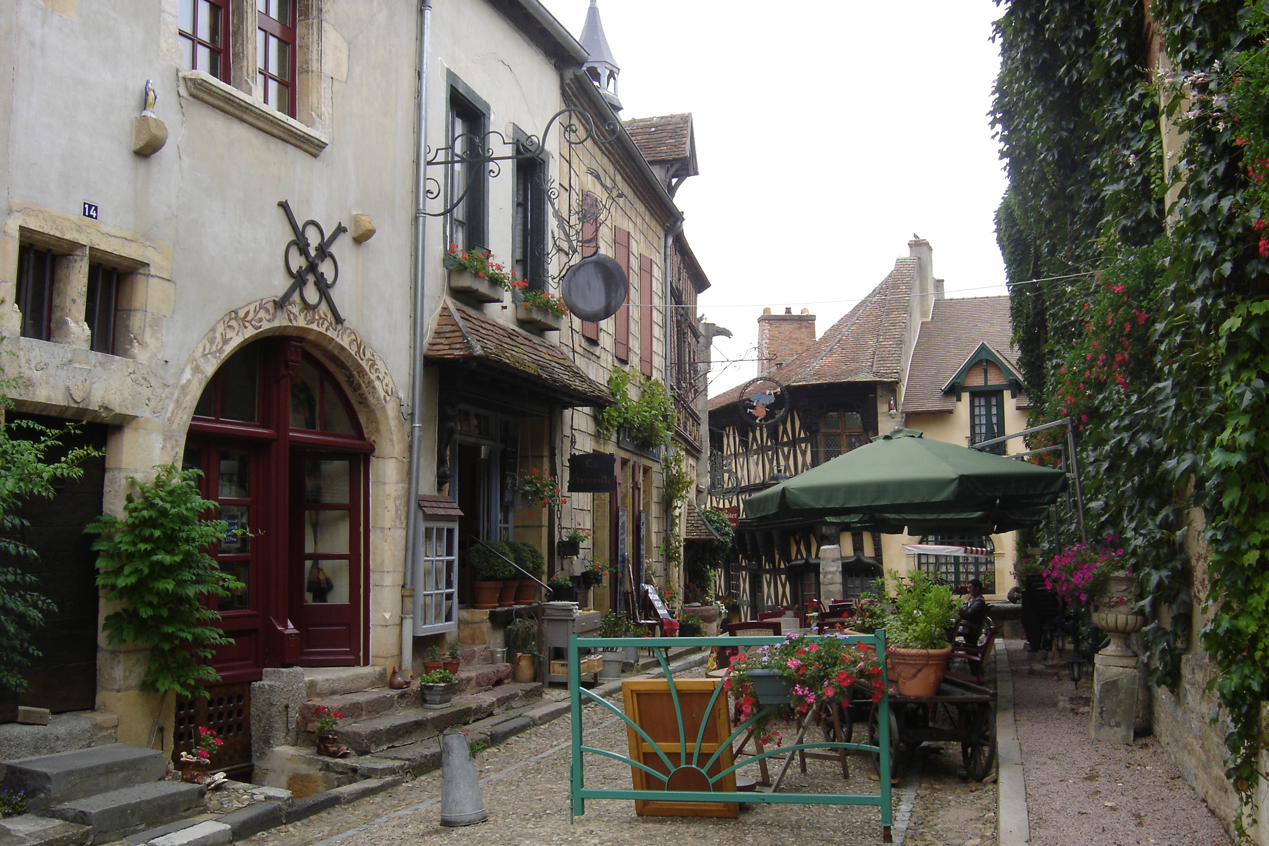 Rue de Bourbon-Lancy. La maison Sévigné est au fond de la rue.